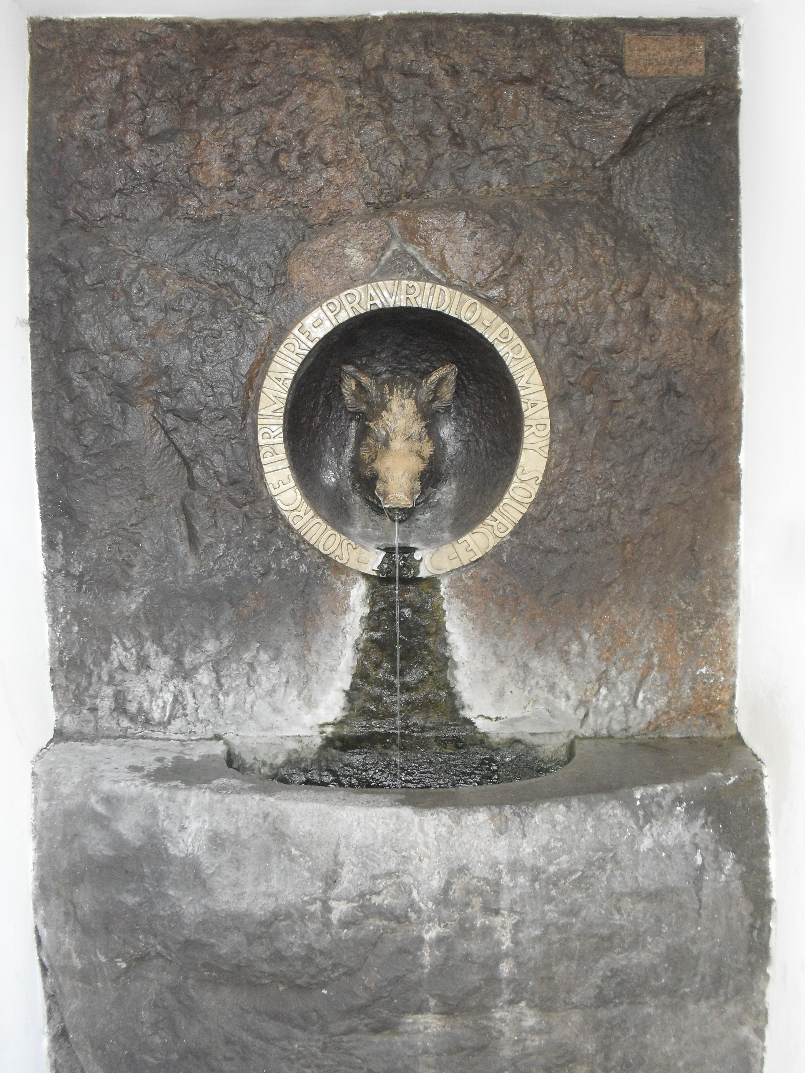 Toto se nachází poblíž bloku domů Beethovenu.